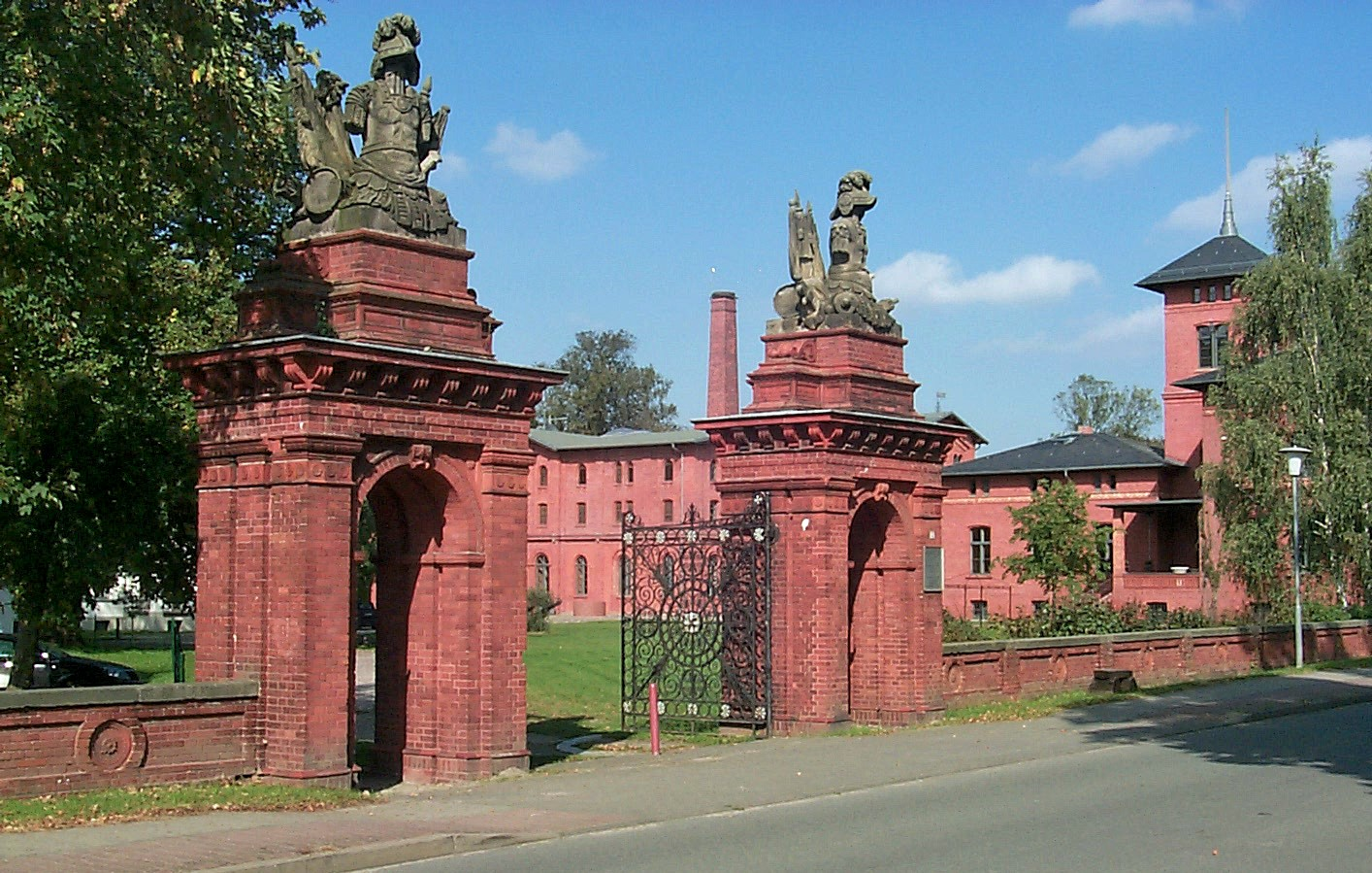 Der kunstsinnige Albert Borsig (* 1829; † 1878) - Sohn von August Borsig - erwarb nach dem Abriss des Tores und der Akzisemauer in Berlin den Torschmuck und setzte sie auf die Ziegelpfeiler des Eingangstores seines gerade erworbenen Gutes (1866) in Groß Benitz, einem Ortsteil von Nauen im Landkreis Havelland / Brandenburg